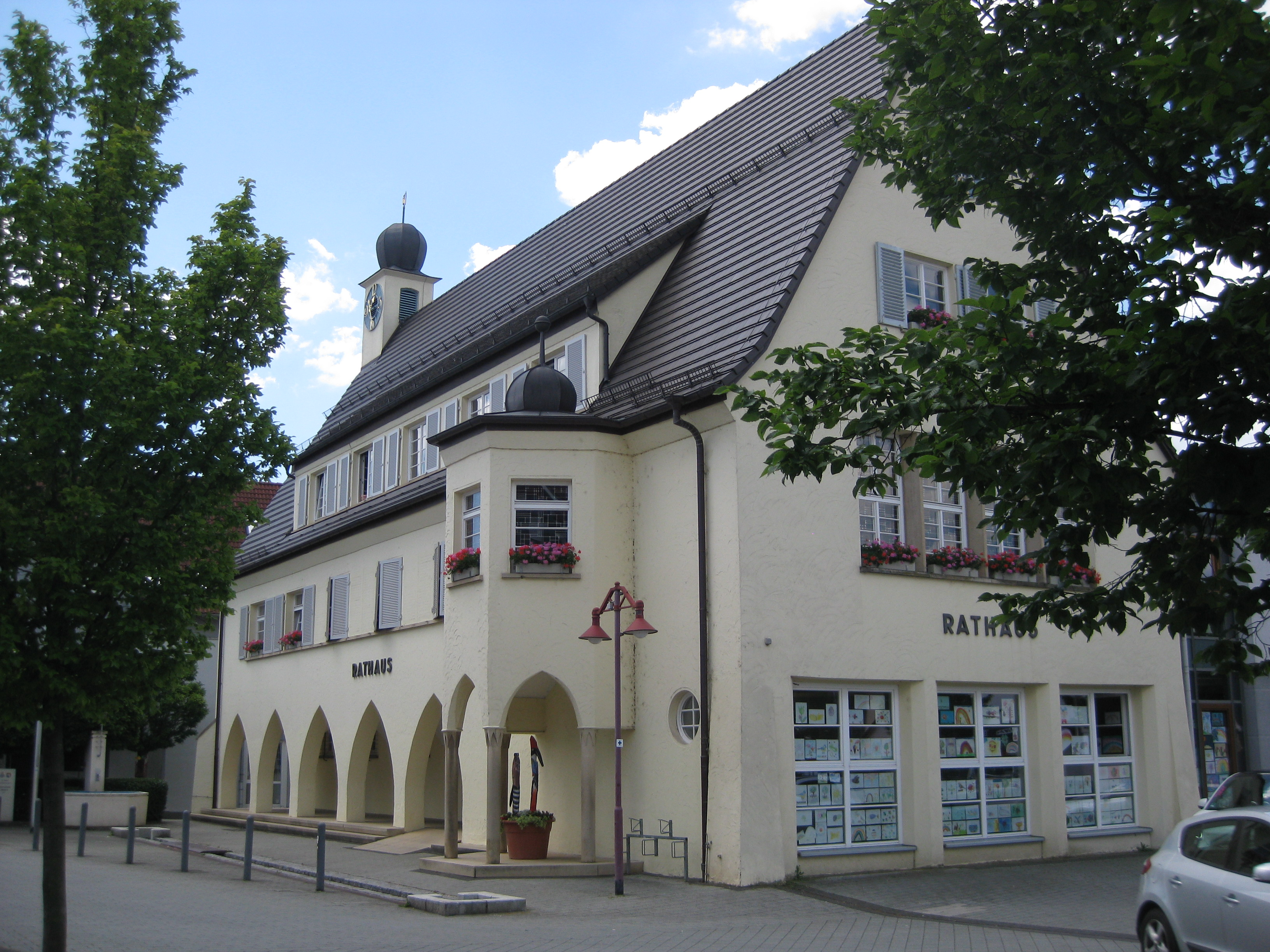 Rathaus in Urbach (Rems) im Jahr 2020